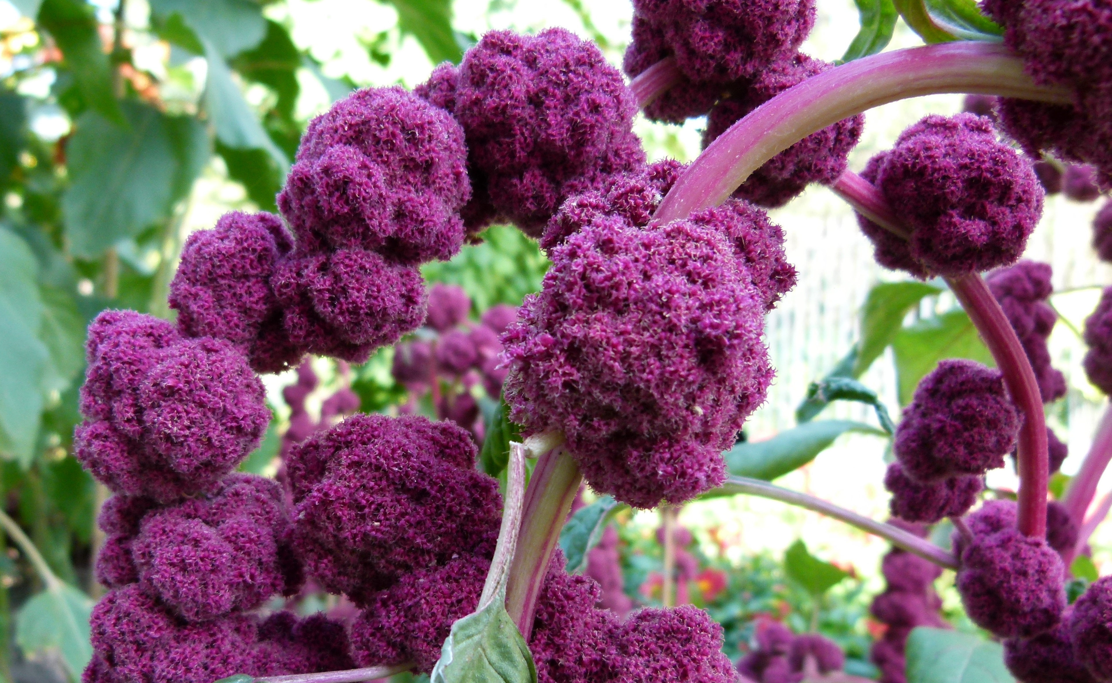 Amaranthus caudatus "Centurion"